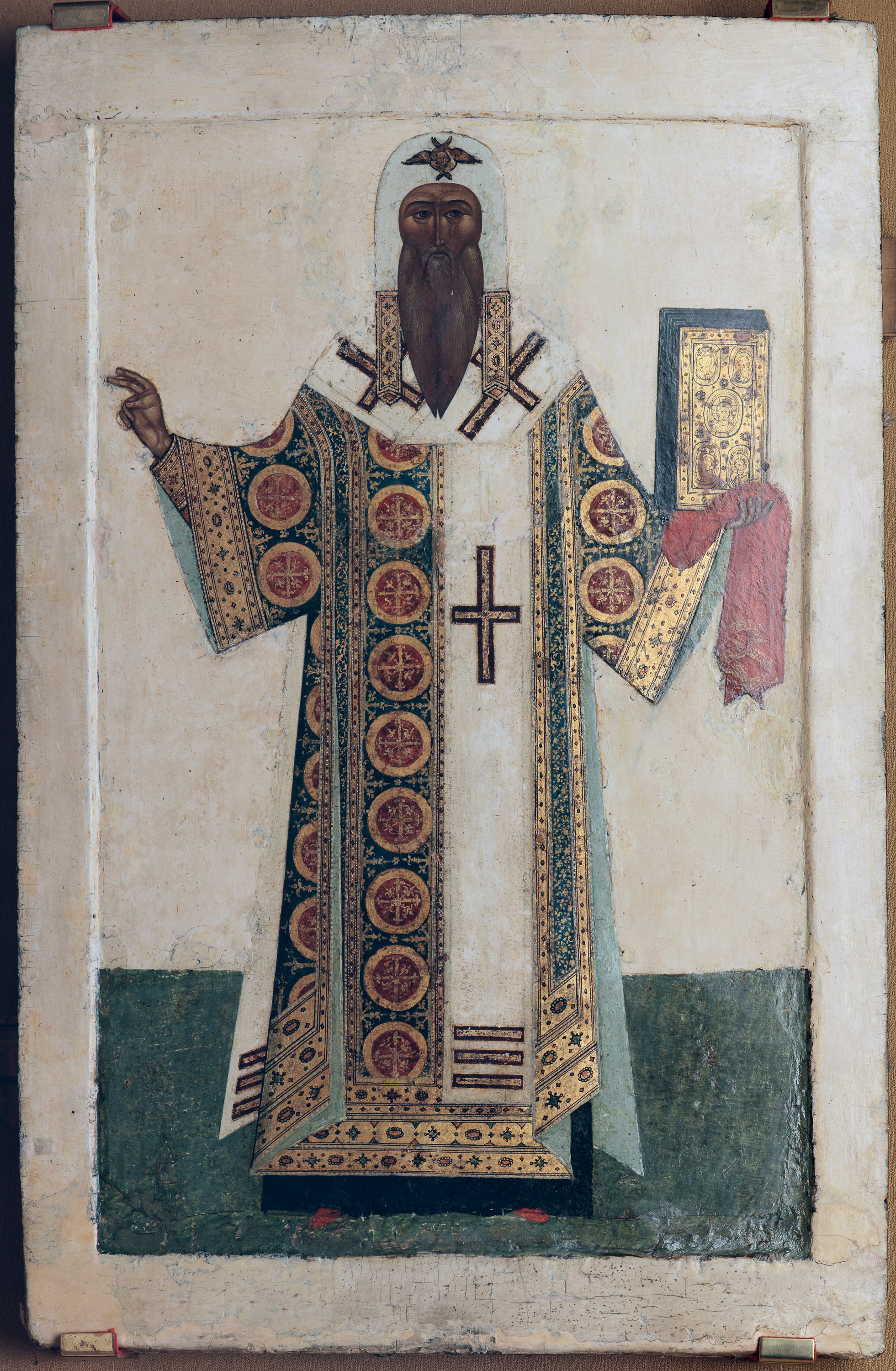 Название музея Государственный музей истории религии Идентификационный номер КП-30141 Материал Дерево, темпера Место создания Россия Размер 45 х 34 см Атрибуция иконы носит вероятностный характер, название ее не сохранилось. Близка по иконографии и стилистически иконе из собрания ГМИР «Св. митрополит Феогност». Выполнена как повторение древней иконы с множественными вставками грунта и следами басменного оклада. Из письменных источников известно о существовании иконы св. Макария на его гробнице в Успенском соборе, известны его отдельные изображения в миниатюрах, фресках и иконах до официальной канонизации.